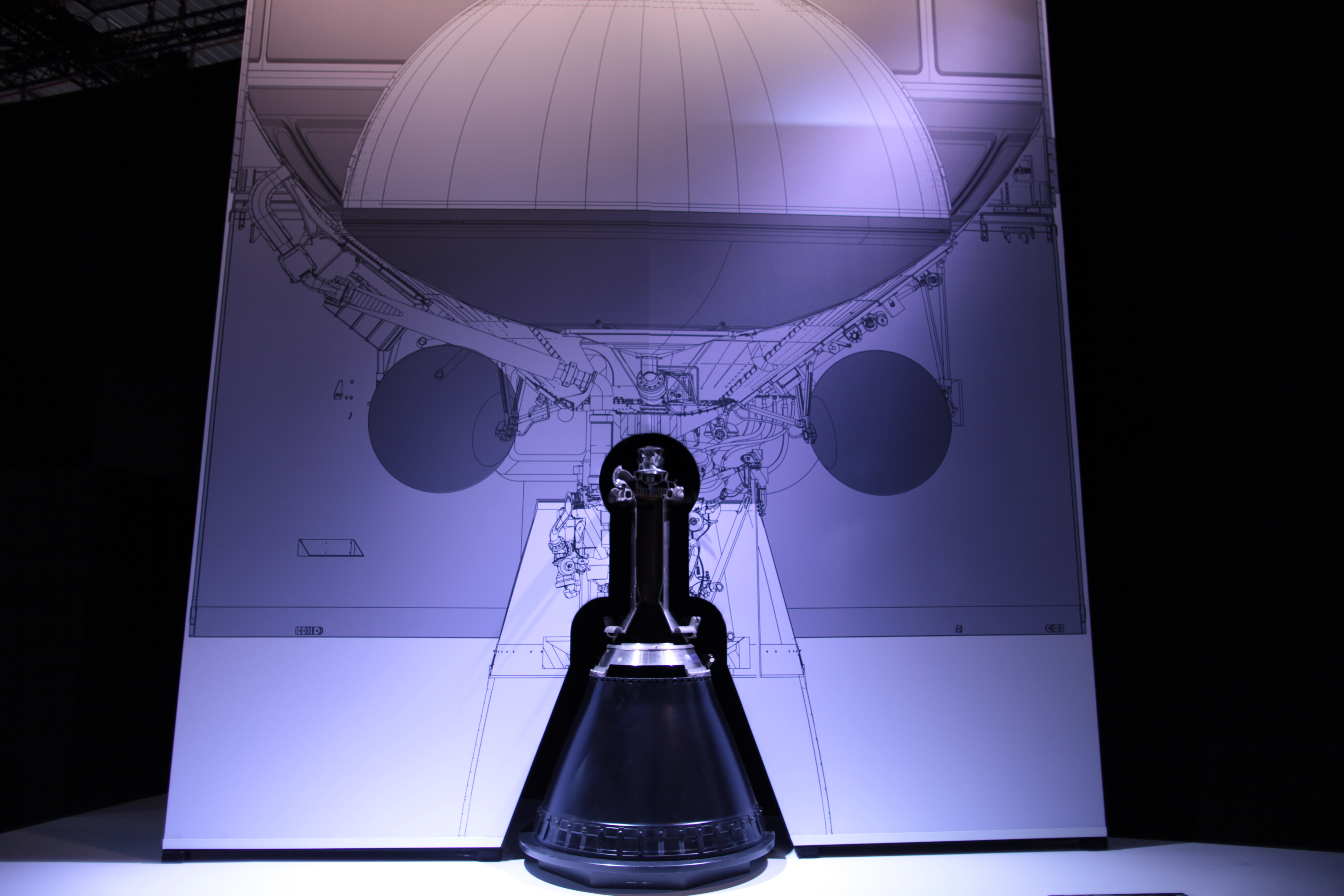 DaVinci-Oberstufentriebwerk / Vinci rocket engine